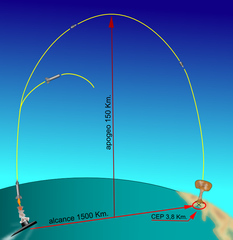 Esquema y parámetros del vuelo de un cohete R-13